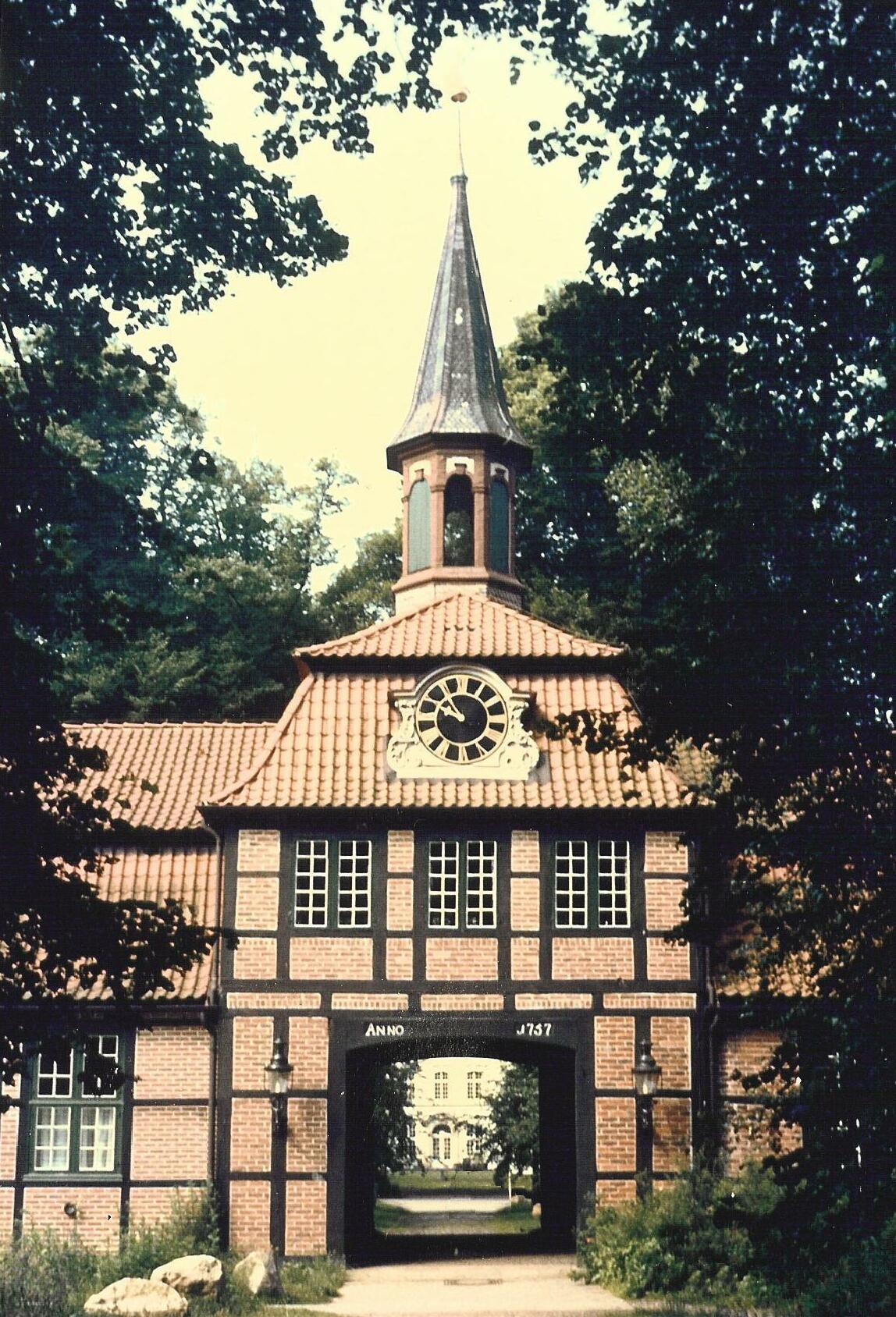 Das Torhaus der Gutsanlage in Wellingsbüttel wurde 1759 von Gregor Greggenhofer erbaut. Es beherbergt heute das Alstertal-Museum. This is a photograph of an architectural monument.